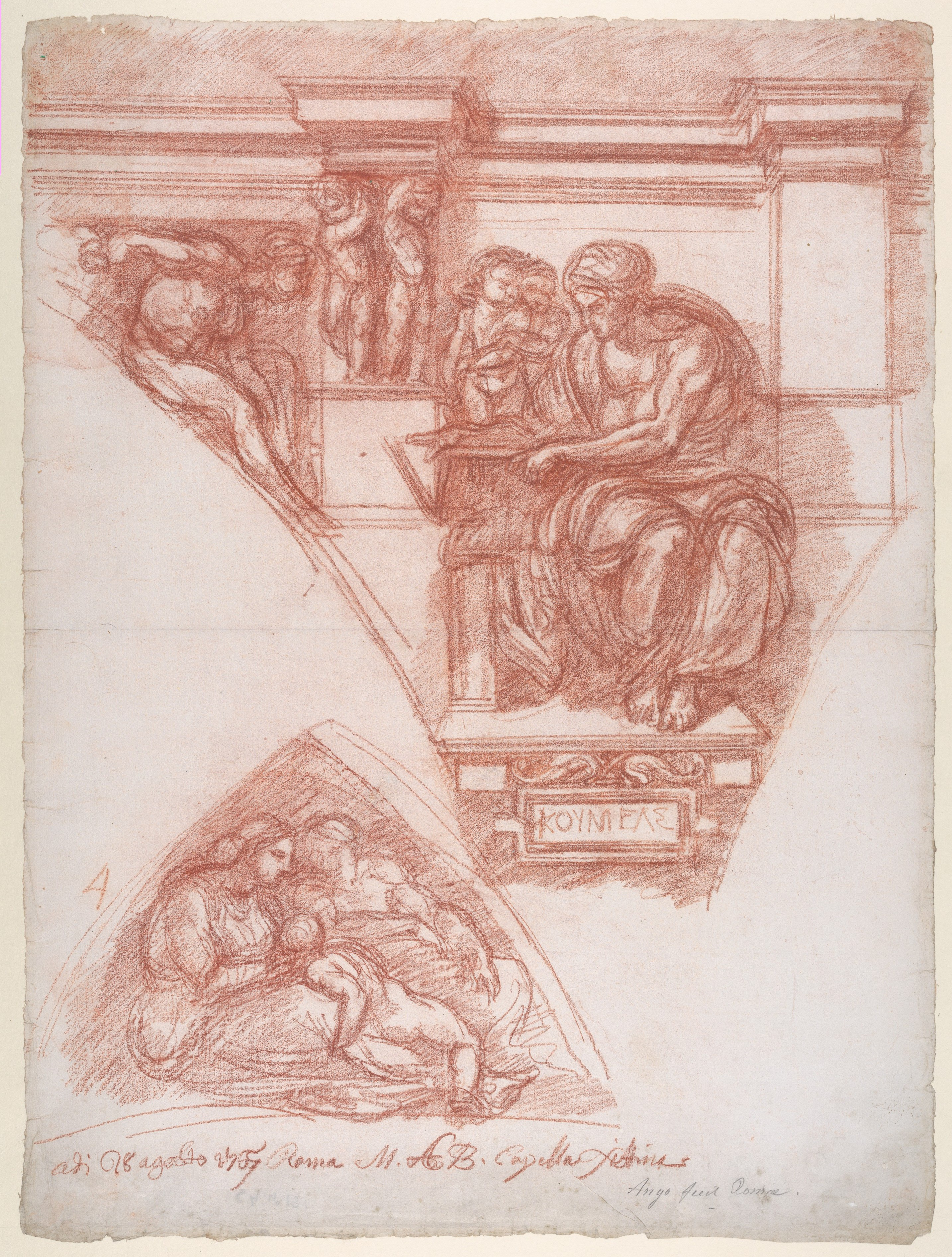 Drawing; Drawings